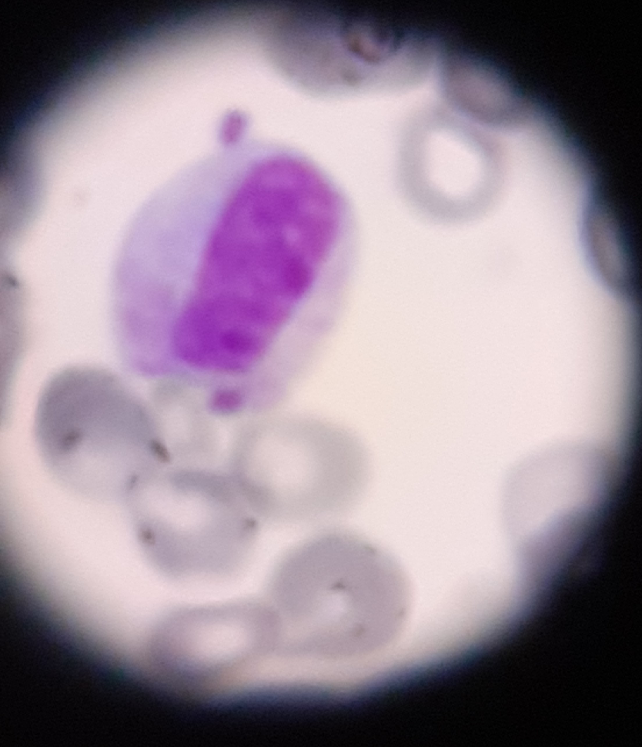 Mielocito en una paciente con leucocitosis de predominio neutrofílico (91 %), con desviación a la izquierda (presencia de promielocitos, mielocitos, metamielocitos y cayados de neutrófilos en sangre periférica), vista con tinción de May-Grünwald-Giemsa modificada para urgencias a 1.000 aumentos